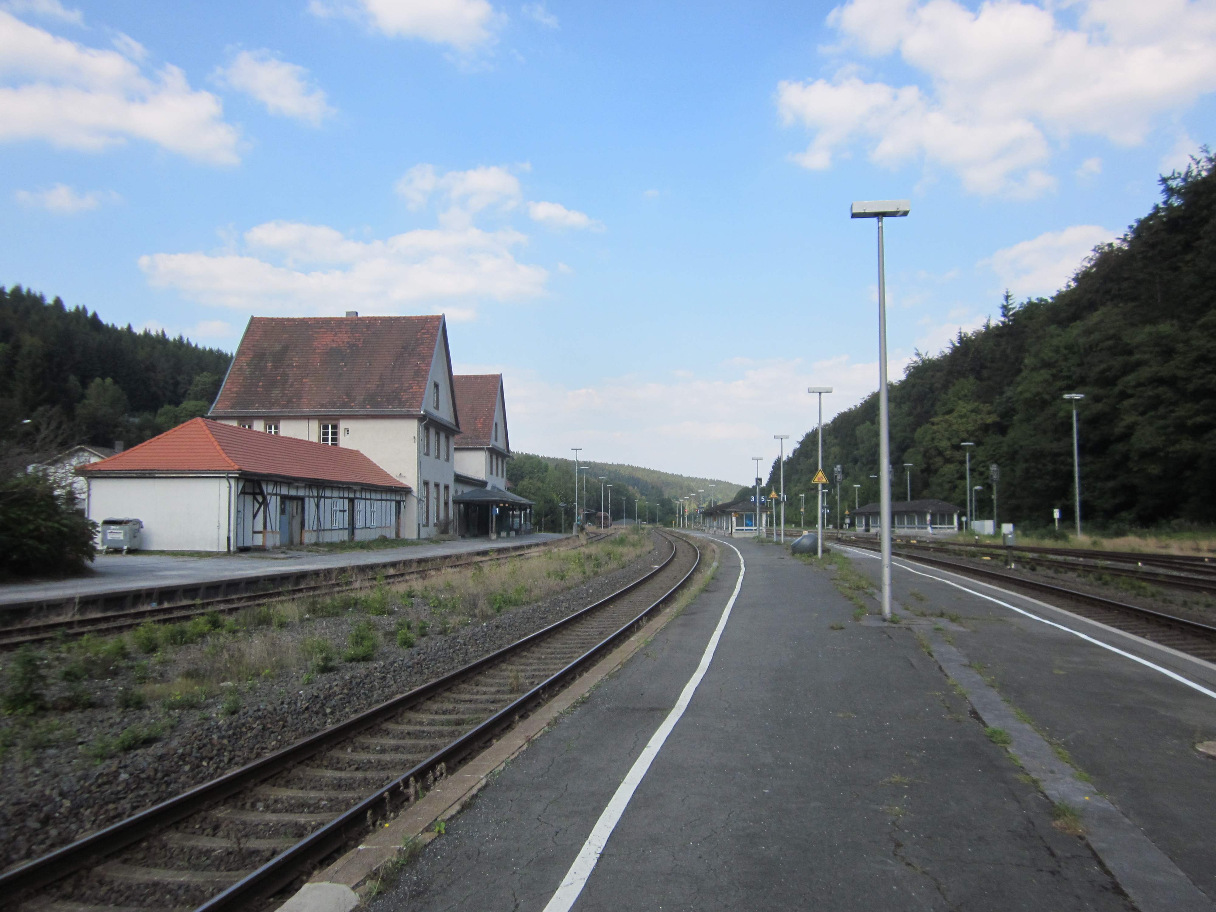 Blick vom Südende Bahnsteig 3/5 auf den Bahnhof Brilon Wald